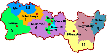 A kassai kerület járásai (Szlovákia)